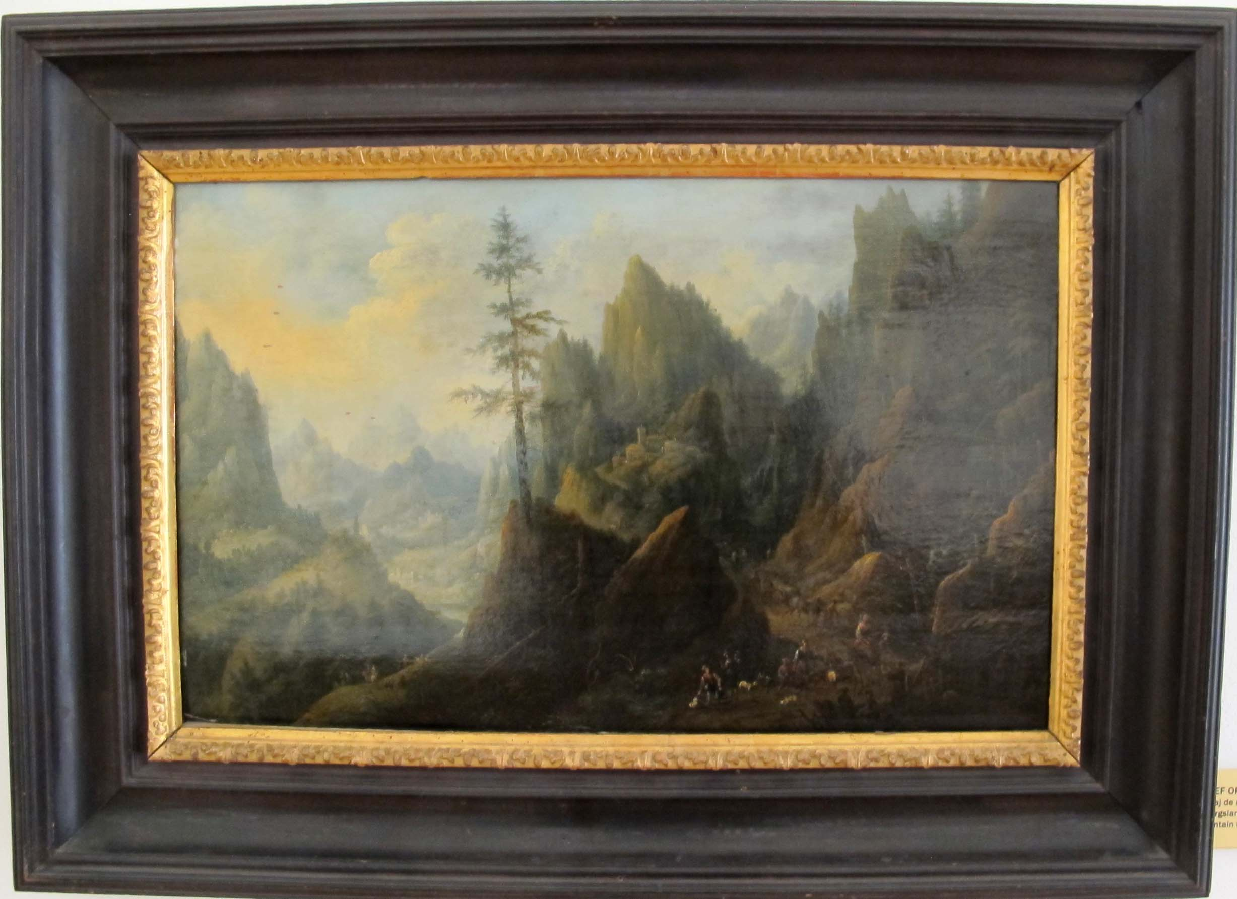 Josef orient, paesaggio montano